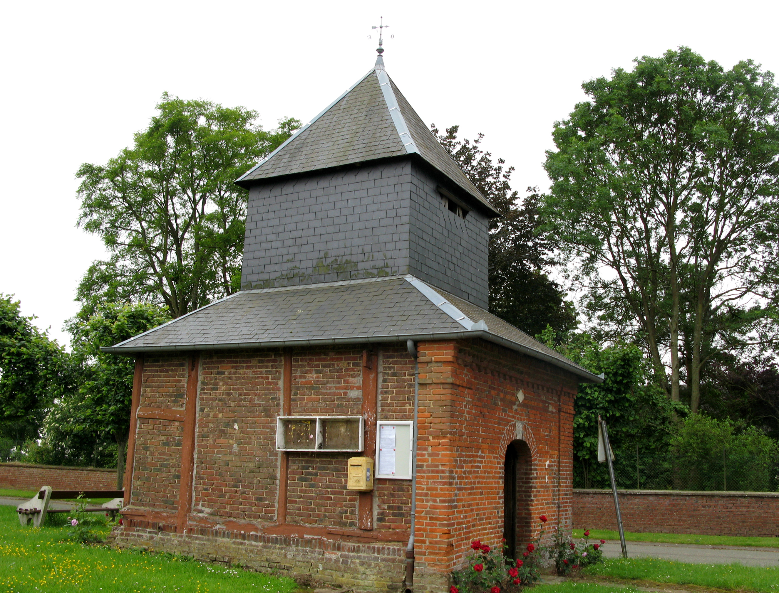 Le Plessier, hameau de Grivesnes (Somme, France) - Ce petit bâtiment communal pourrait avoir eu pour fonction d'abriter autrefois le matériel des sapeurs-pompiers (hypothèse à vérifier).